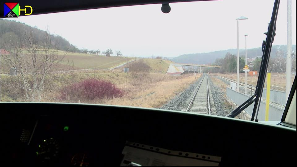 Führerstandsmitfahrt anders